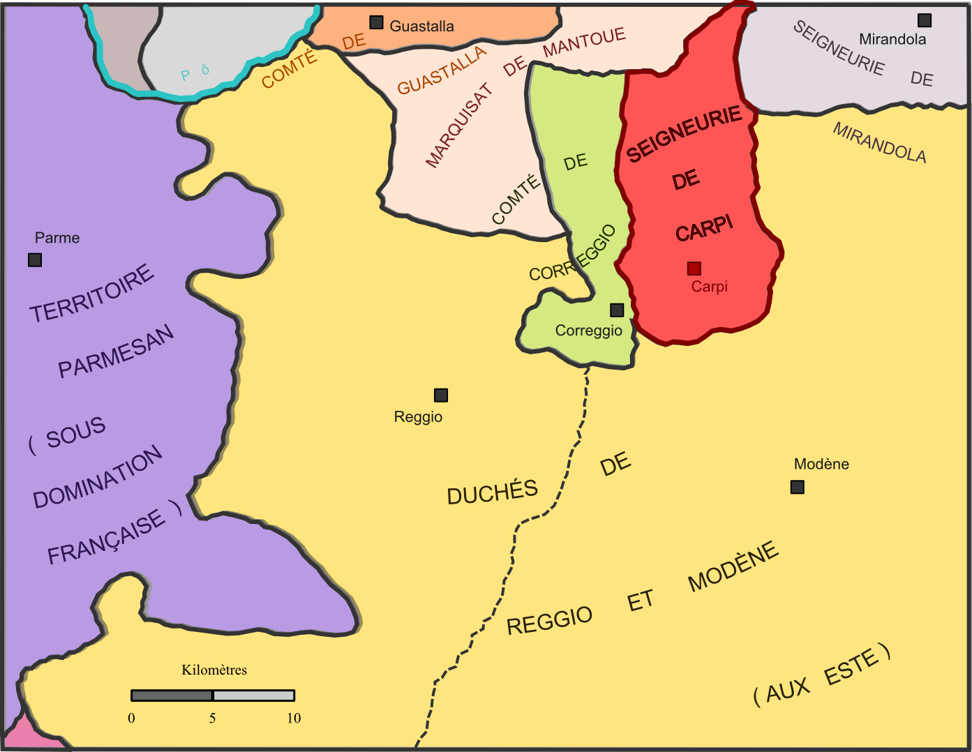 La seigneurie de Carpi (en rouge) et les Etats voisins en 1500.